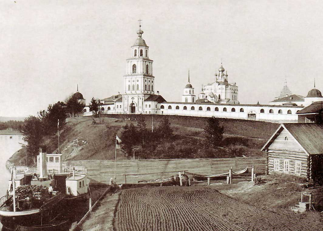 Артемиево-Веркольский монастырь